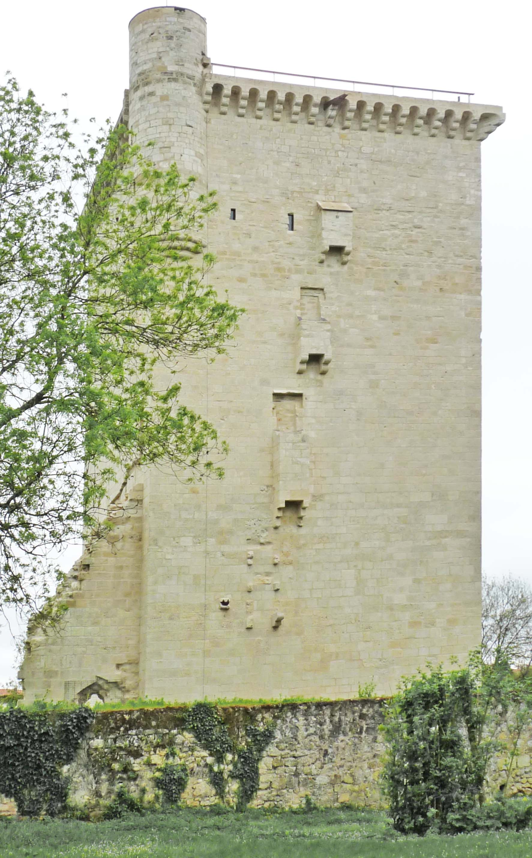 The Honnour Tower in Lesparre.